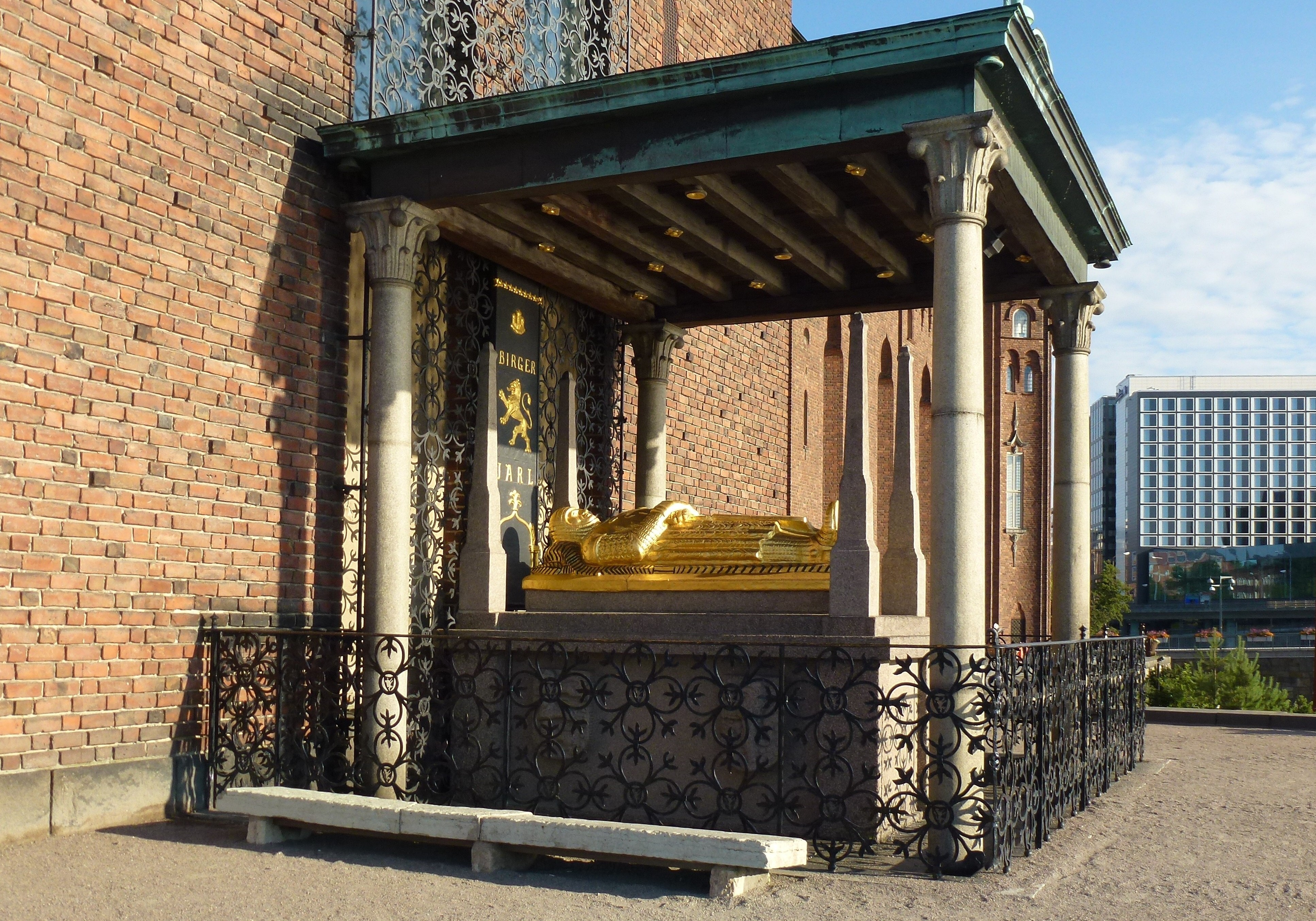 Gustaf Sandbergs kenotaf över Birger jarl